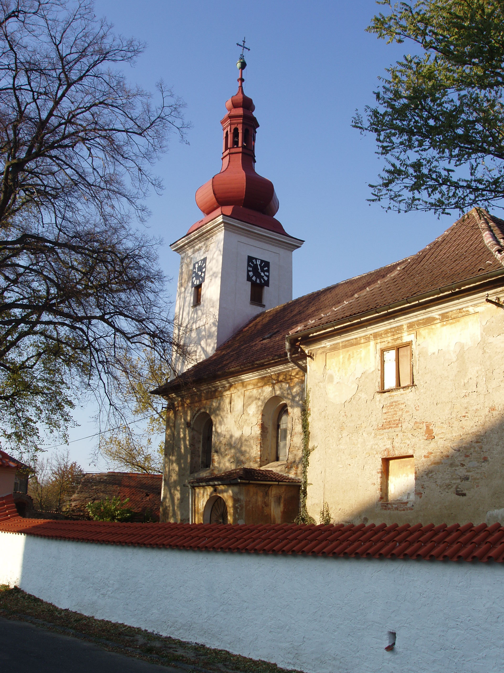 Kostel sv. Bartoloměje (Solopysky), Solopysky